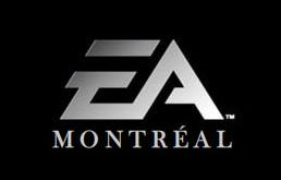 Logo von EA Montreal